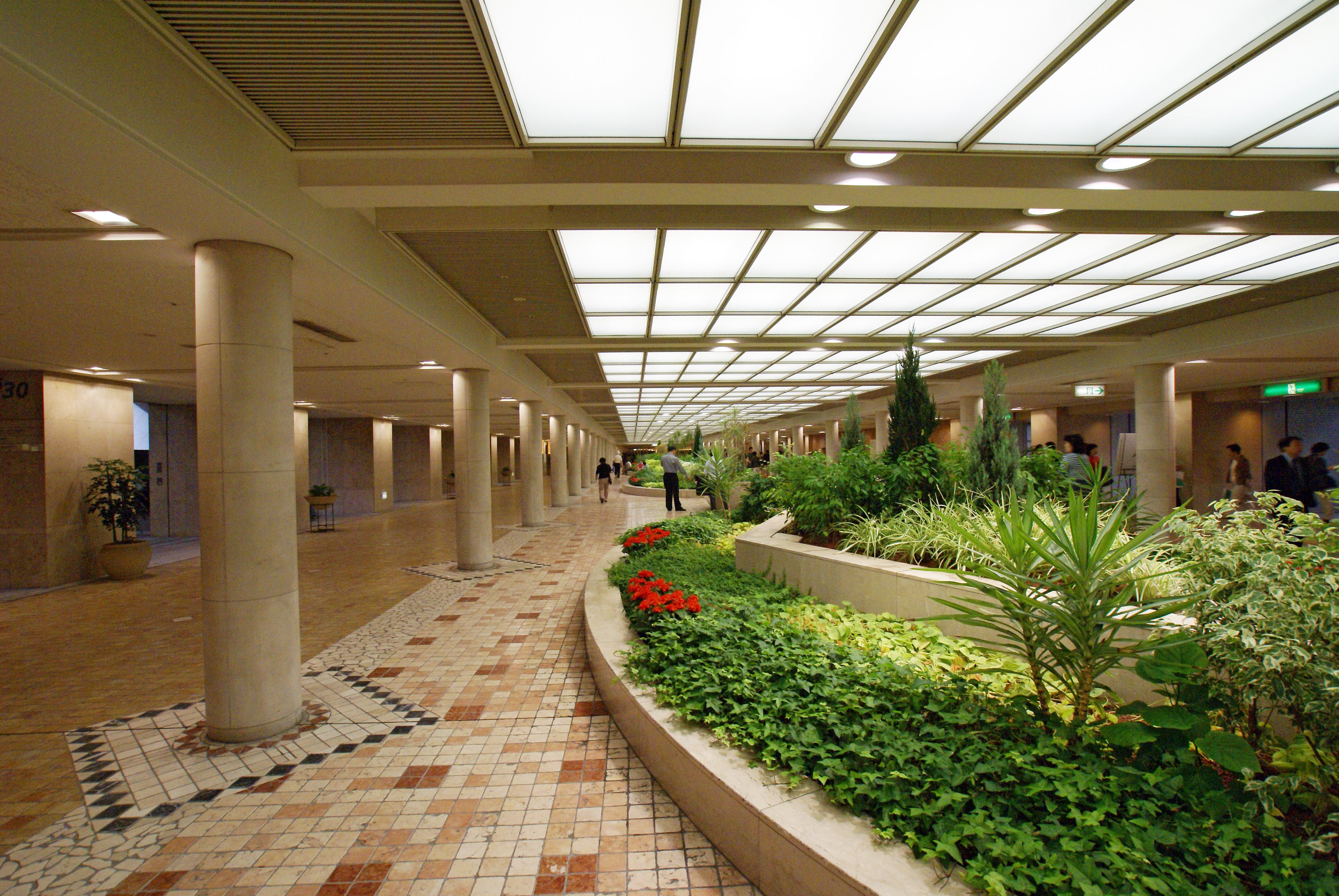 Osaka Garden City in Osaka, Osaka prefecture, Japan